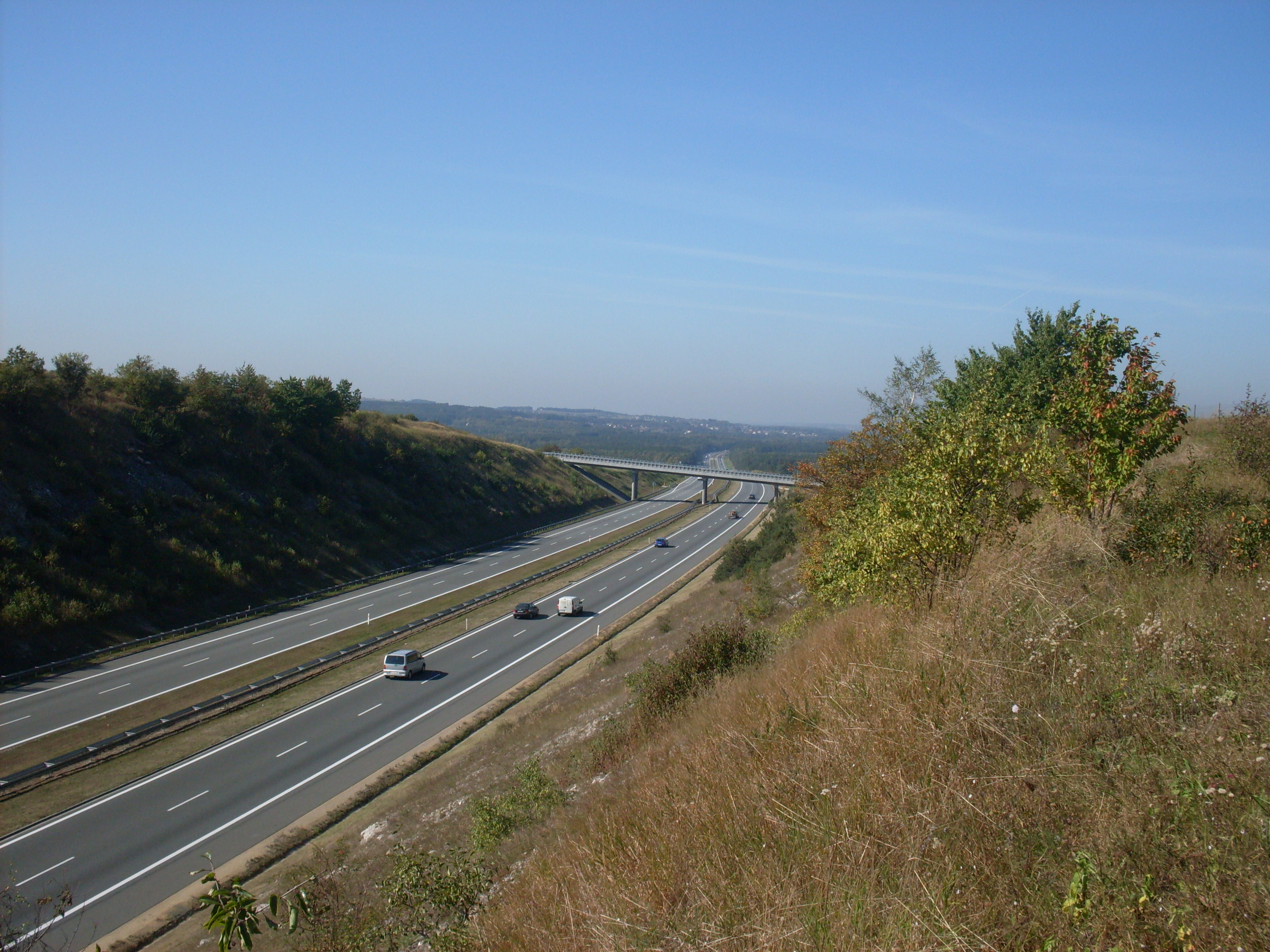 Autostrada A4 Wiadukt widok od strony wschodniej (Krakowa) w kierunku zachodnim (Katowic) w Rudnie (woj.małopolskie)